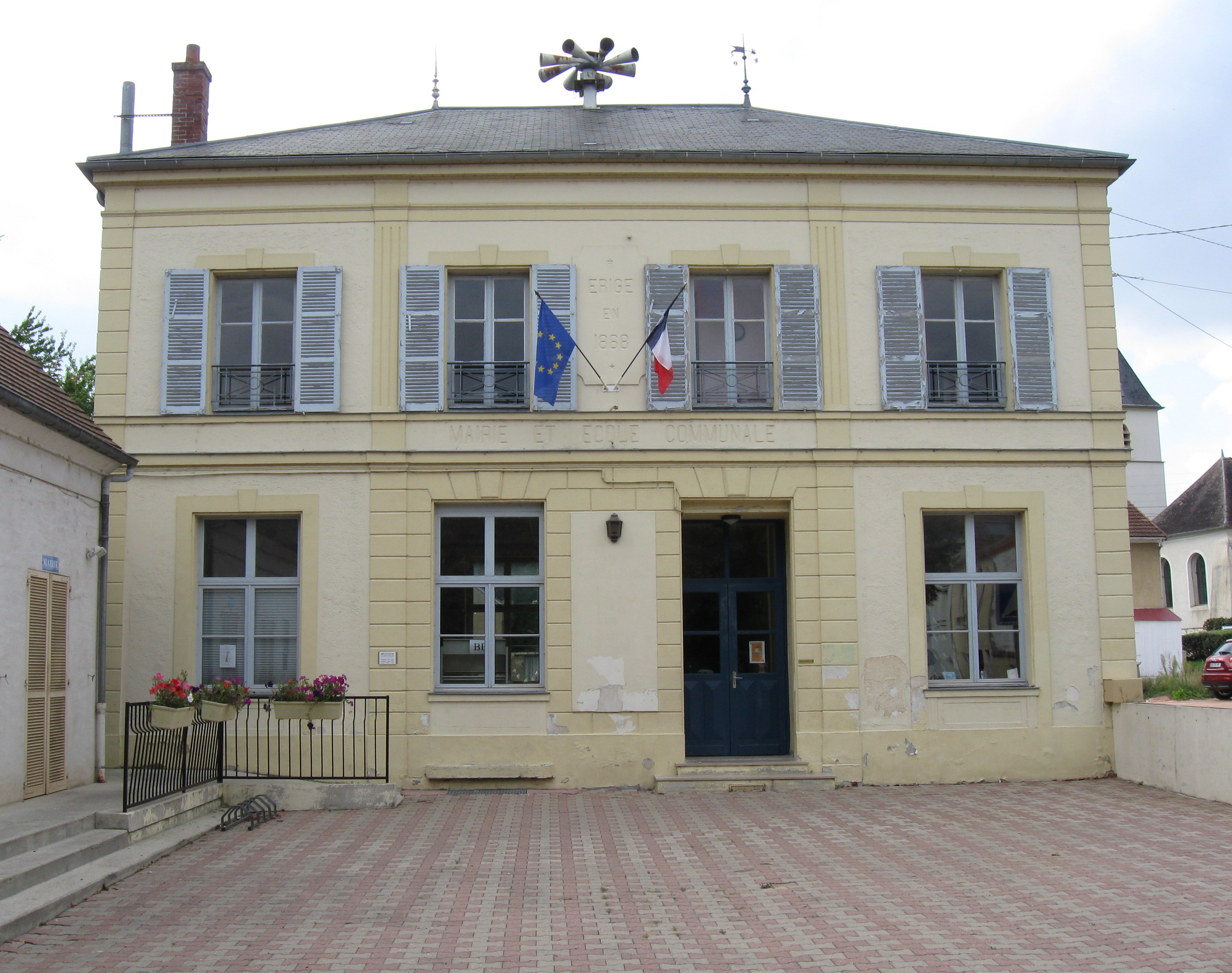 Mairie d'Isles-lès-Villenoy. (Seine-et-Marne, région Île-de-France).